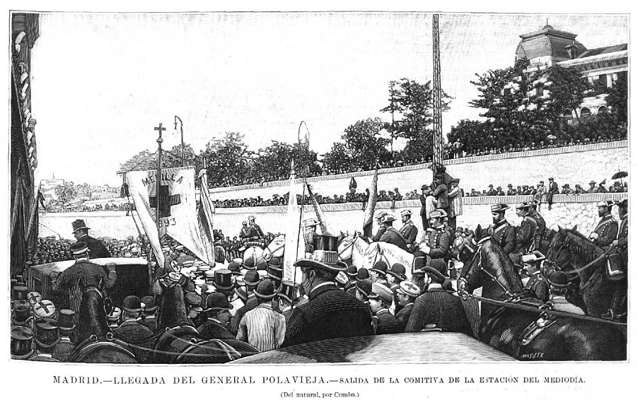 Llegada del general Polavieja a Madrid, salida de la comitiva de la Estación del Mediodía, obra de Juan Comba, recogida en la revista española La Ilustración Española y Americana.